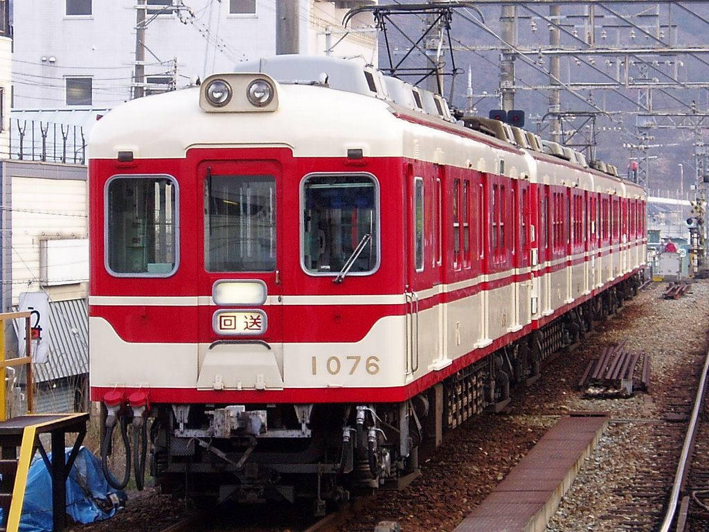 神戸電鉄1076形